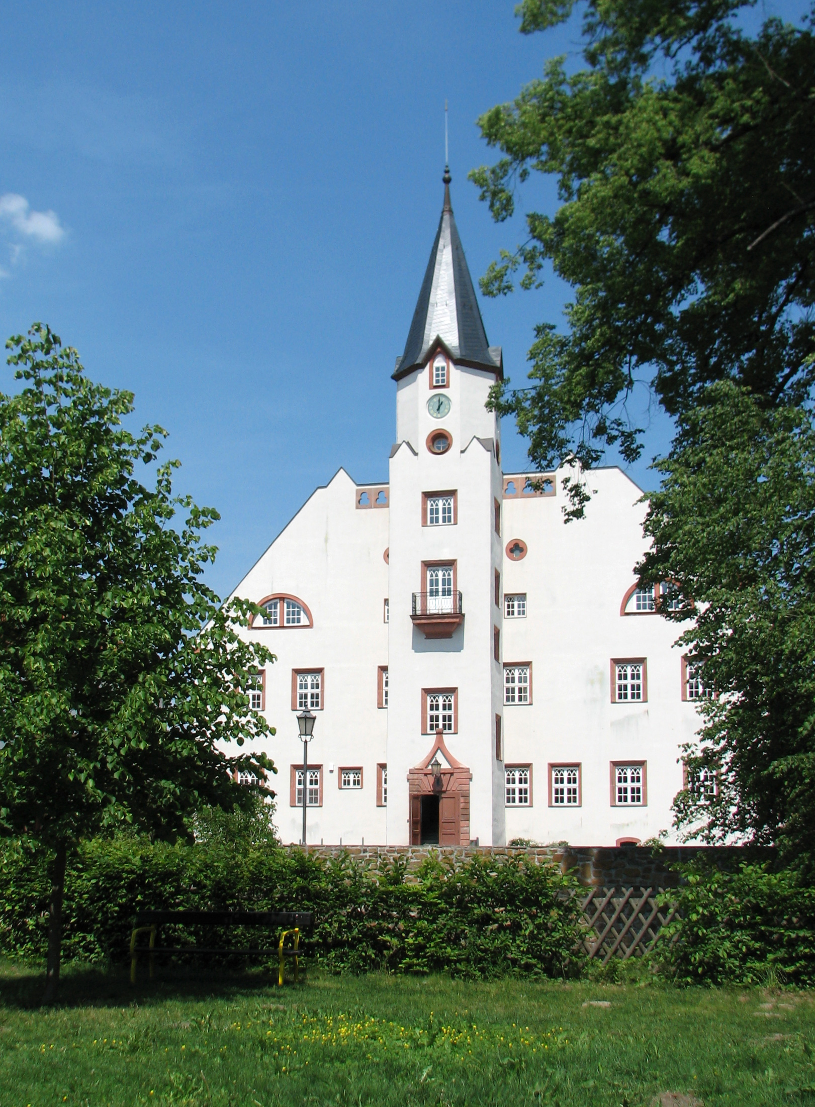 Schloss Belgershain vom Park/Süd aus gesehen. Zwischen Park und Schlossvorplatz befindet sich noch ein gemauerter Schlossgraben.